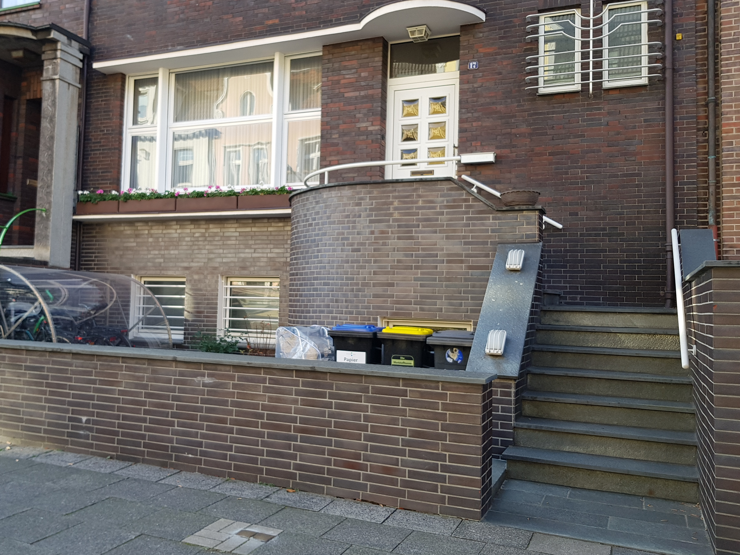 Stolpersteine Prinz-Albrecht-Str. 17, Duisburg-Duissern